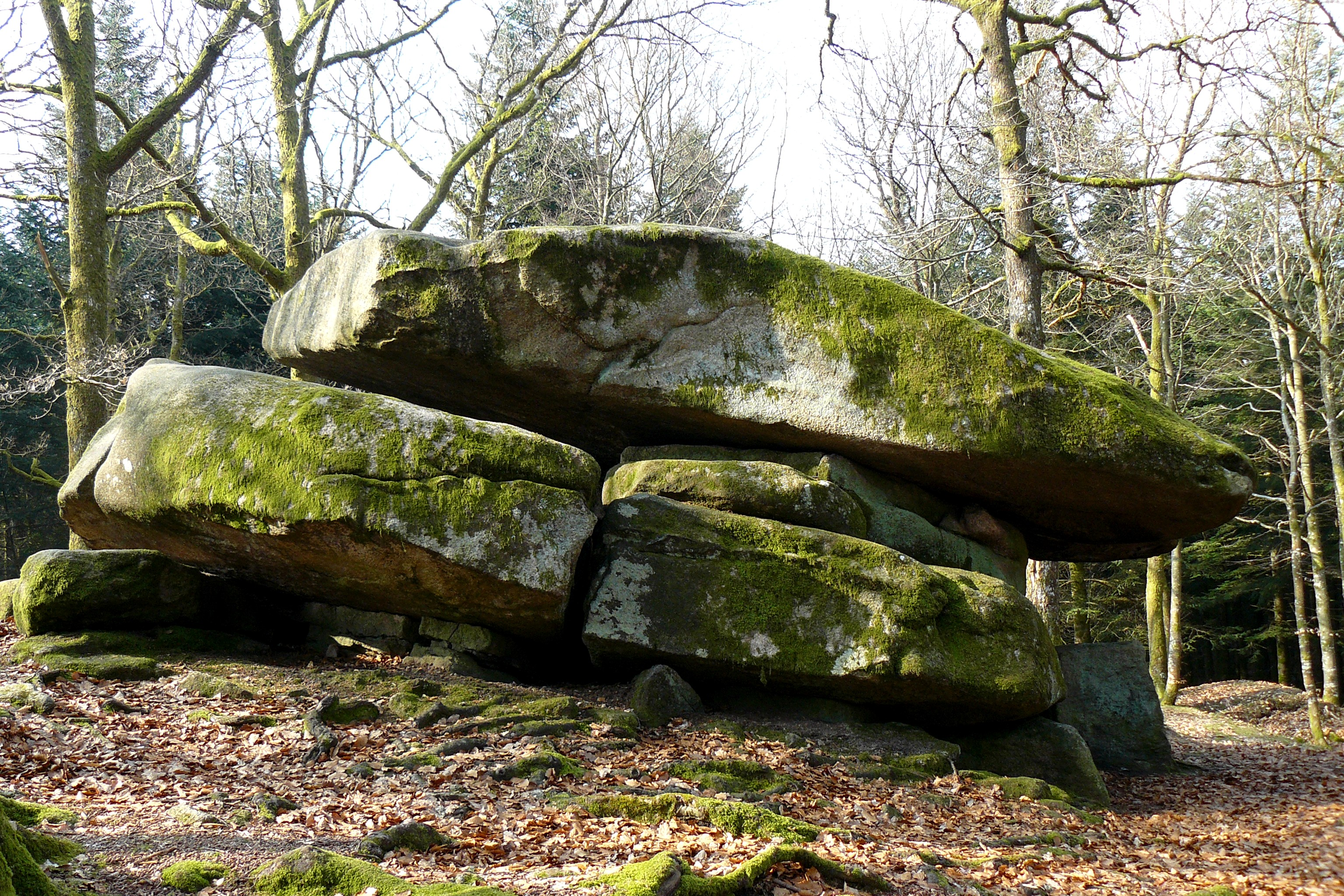 "Dolmen" de Chevresse à Saint-Brisson (Nièvre, France)